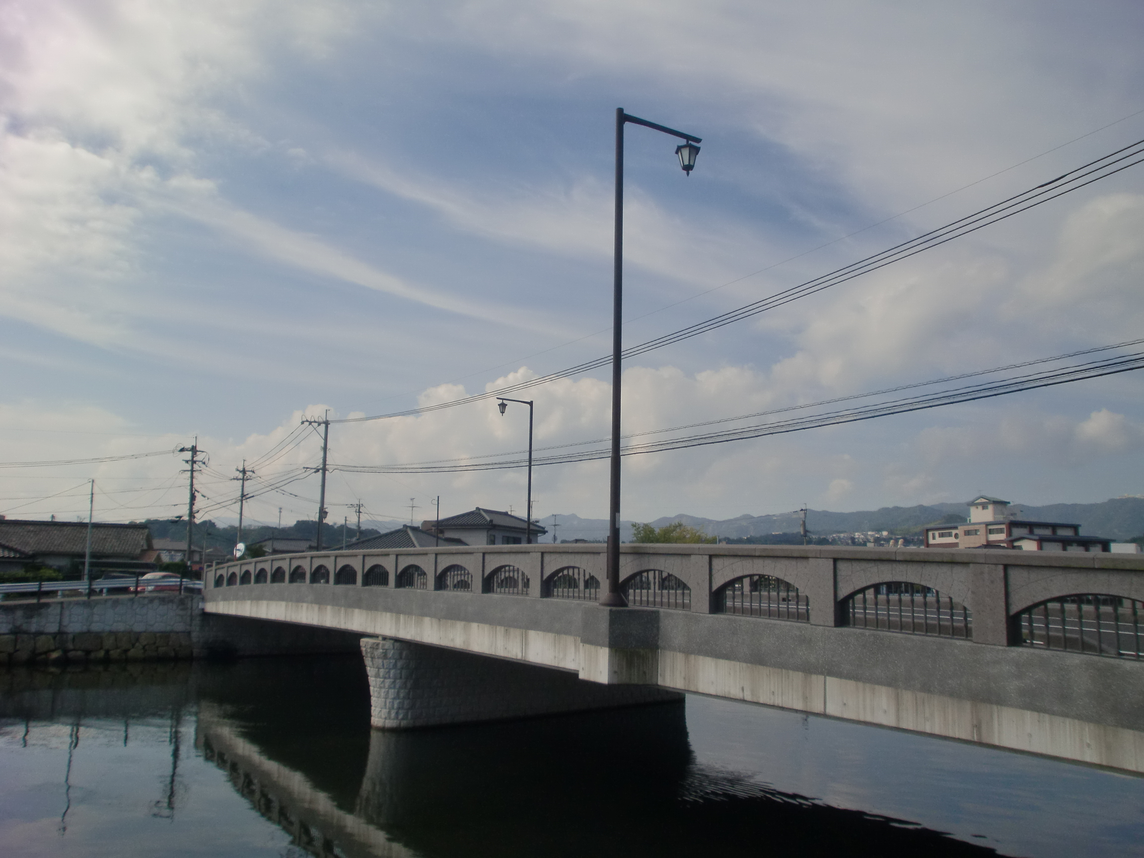 潮見橋の2010年現在の様子。昔の石橋時代の面影はあまり残っていない。